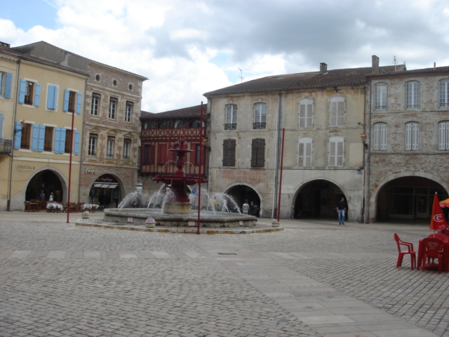 Place et fontaine de Villeneuve-sur-Lot